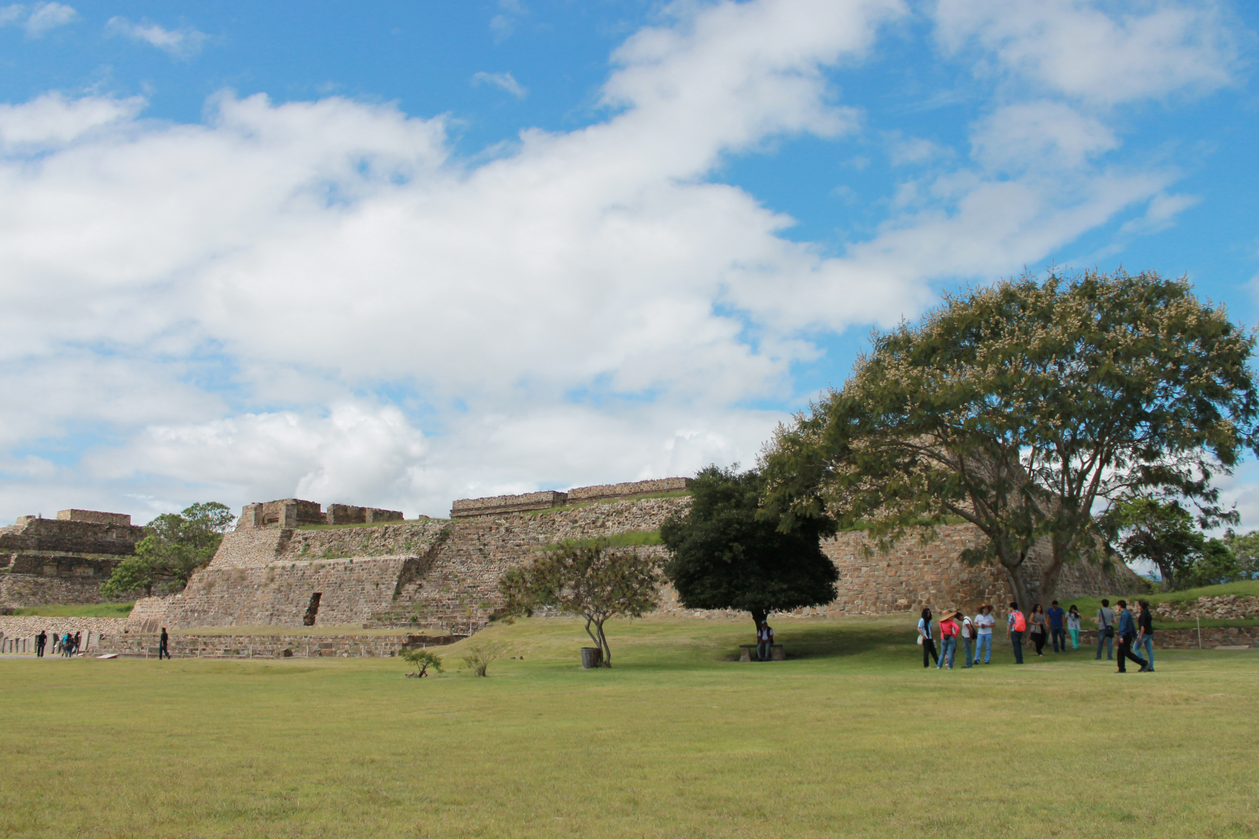 Se aprecia una perspectiva del Edificio de los Danzantes. En la parte izquierda de la foto, al fondo, se aprecia una parte de la Galería de los Danzantes y la edificación posterior del Sistema M.